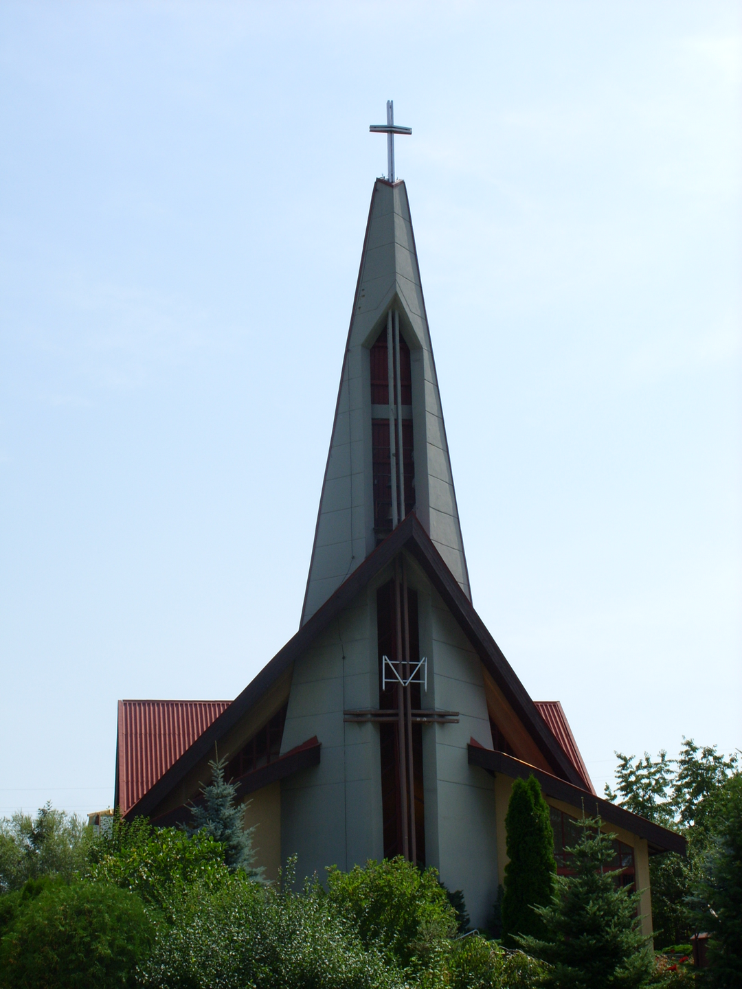 Kościół Miłosierdzia Bożego w Żywcu-Moszczanicy